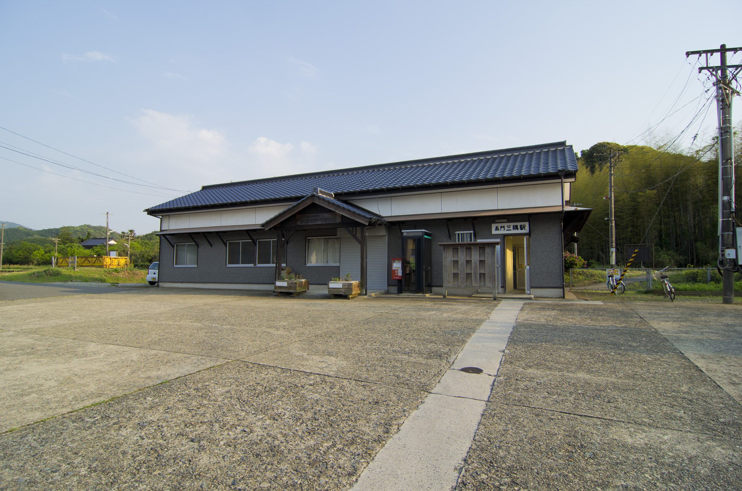 西日本旅客鉄道株式会社山陰本線長門三隅駅